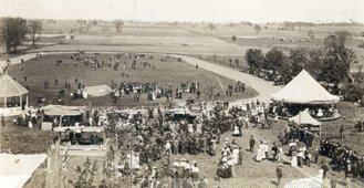 Richmond Hill Spring Fair